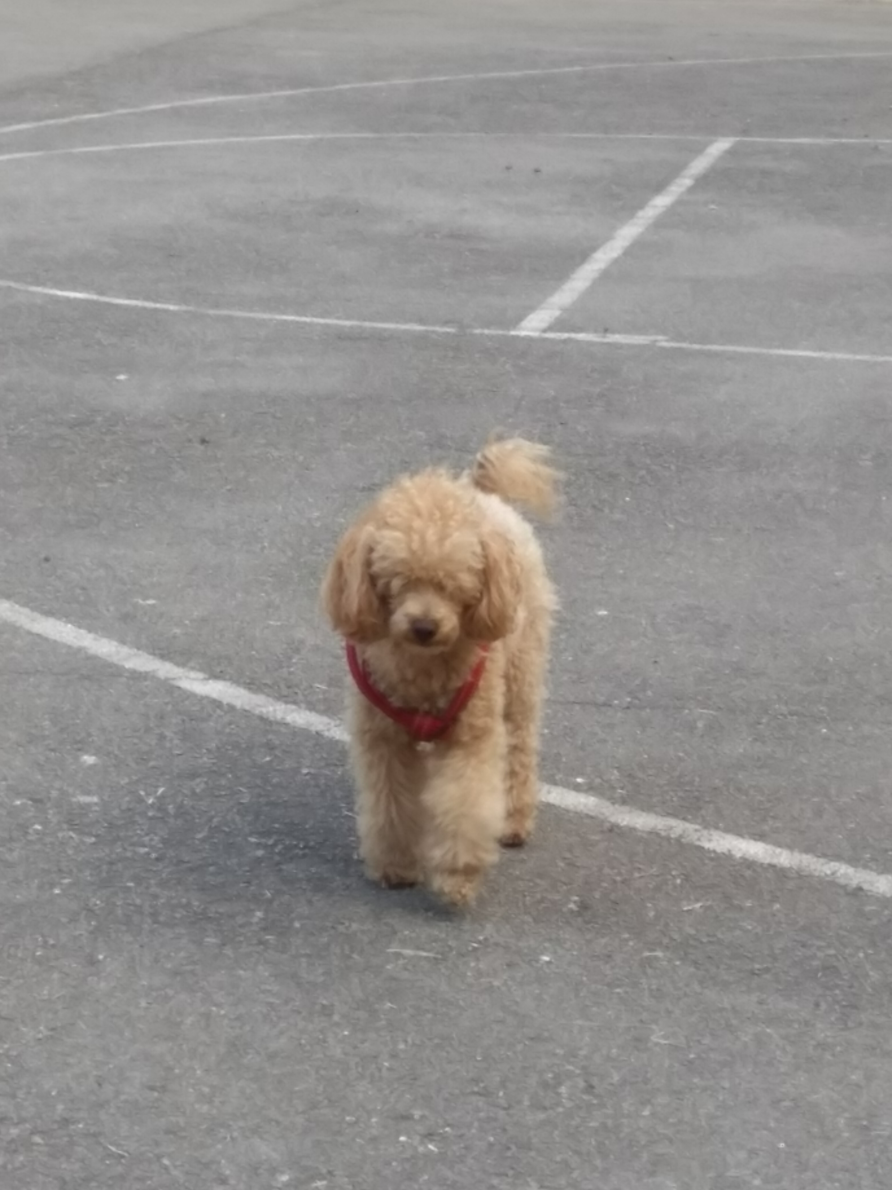 Пудла очешљане длаке